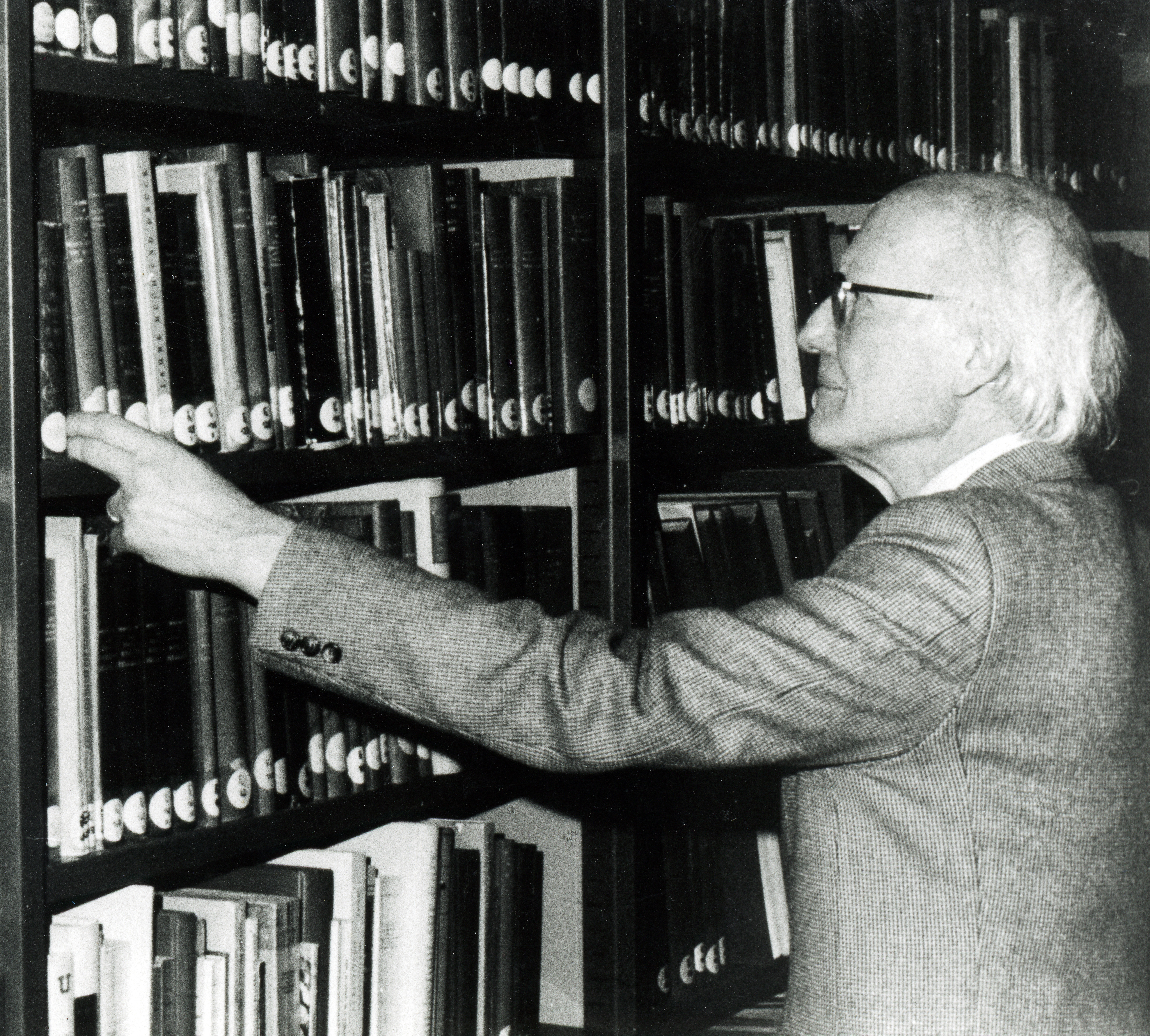 Rodolphe Peter, pasteur et professeur de théologie, dans l'ancienne bibliothèque du Stift à Strasbourg, pendant les années 1980.